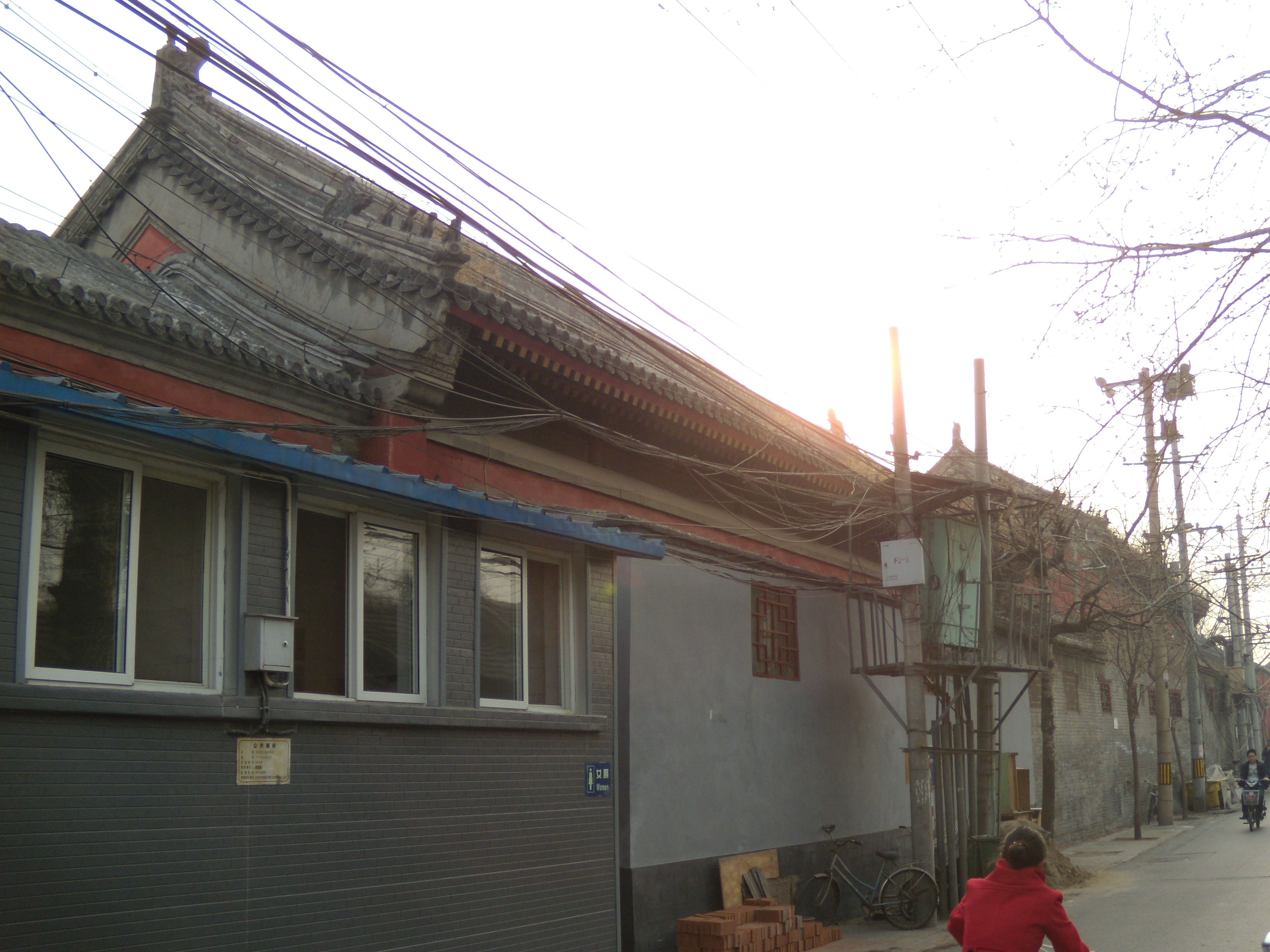 嵩祝寺北侧